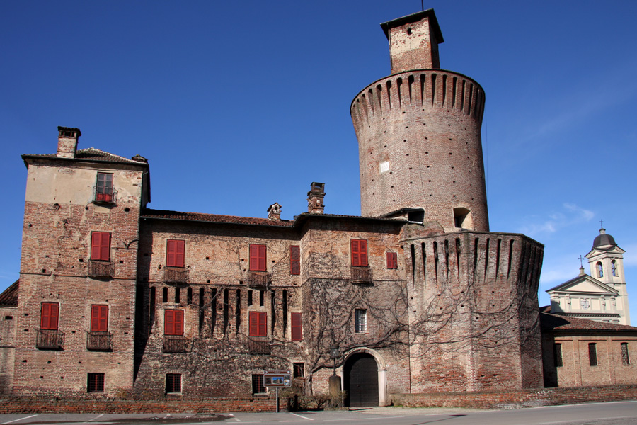 Il castello di Sartirana Lomellina con la chiesa di San Rocco